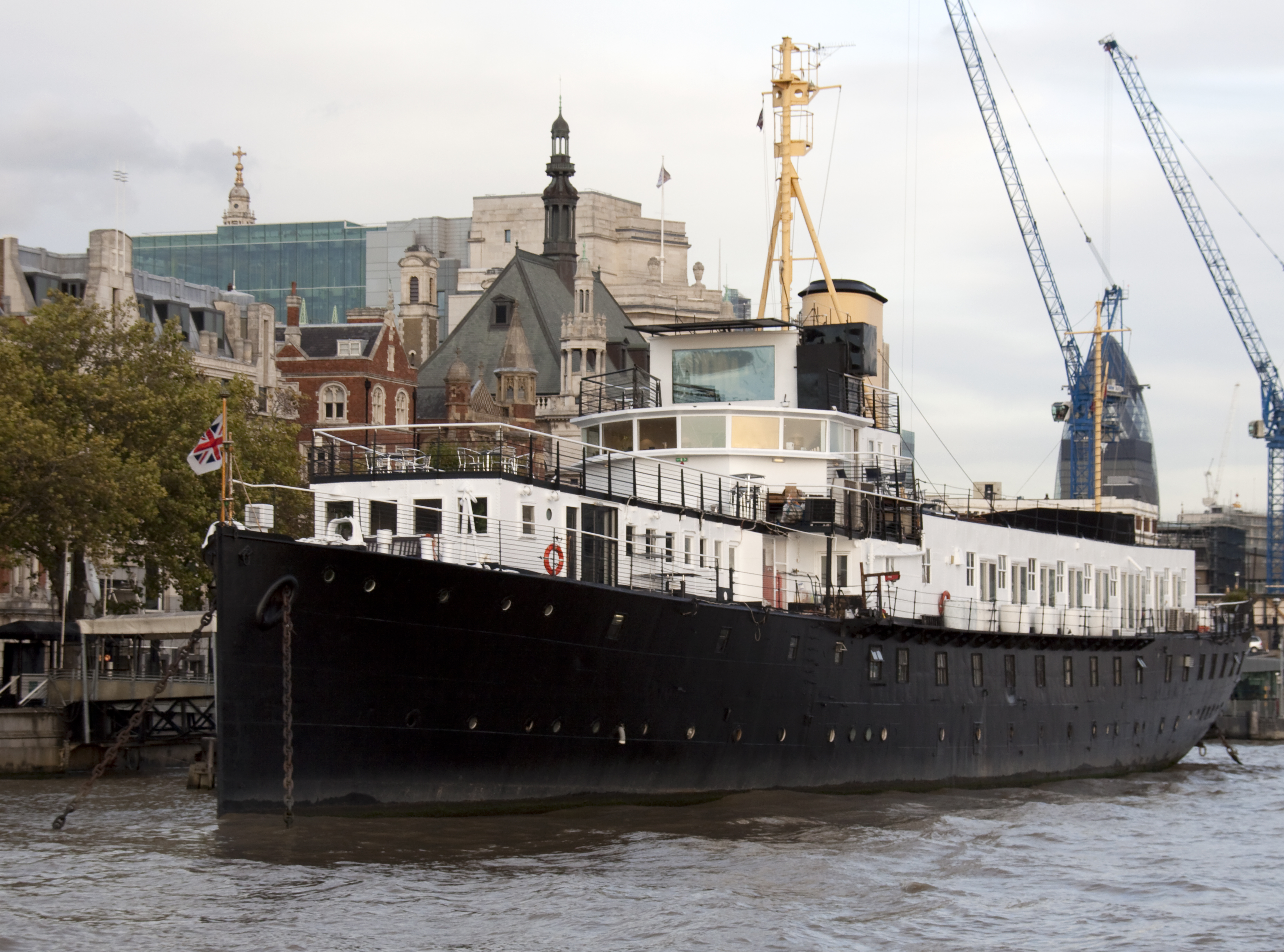 HMS President